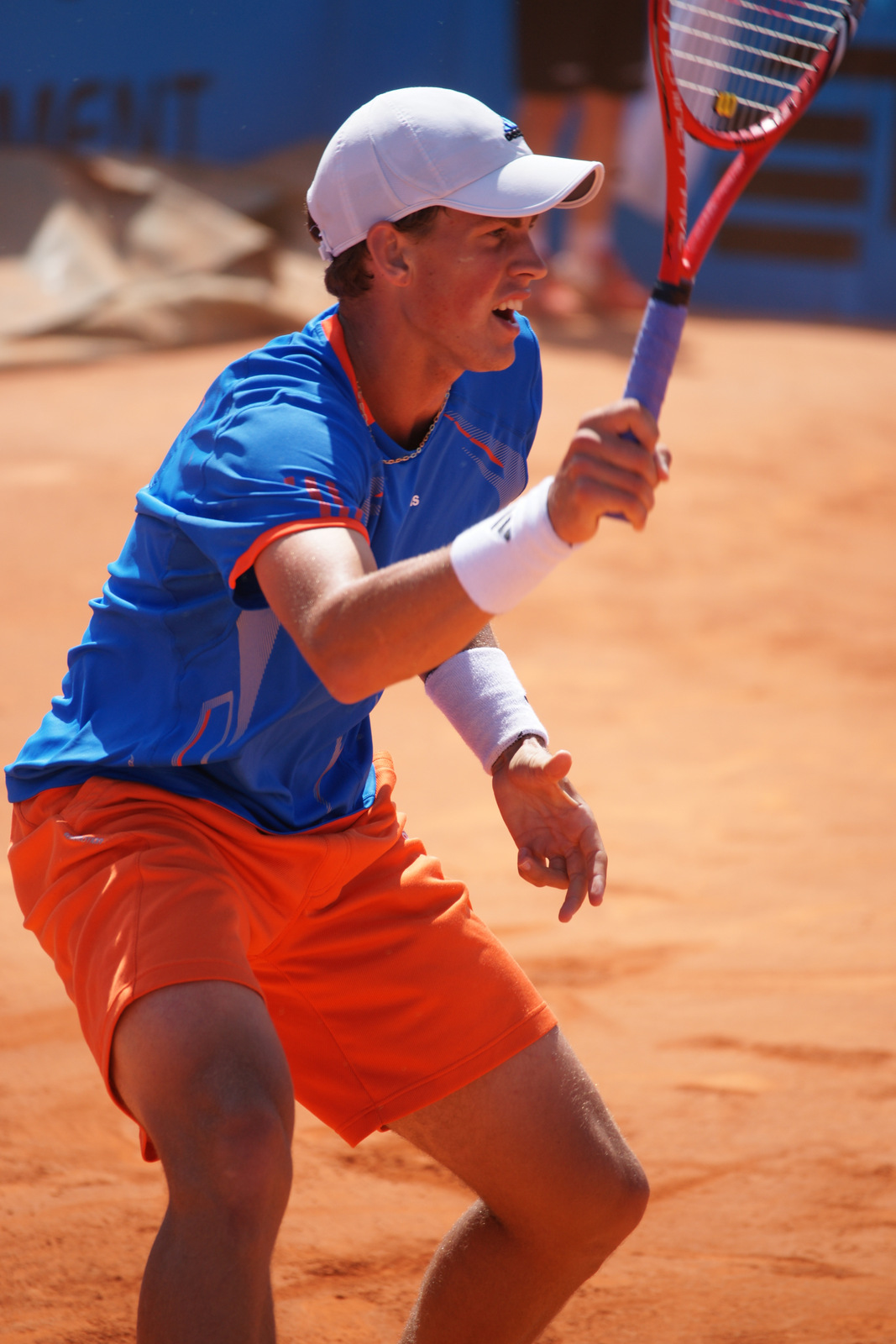 Vasek Pospisil, Open tennis Nice 2012